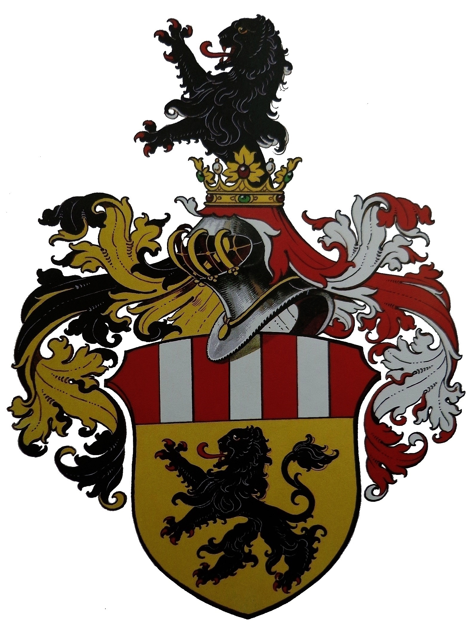 Wappen des Ingenieurs Dr. h.c. Ferdinand Neureiter senior, Direktor der österreichischen Siemens-Schuckertwerke, dem Kaiser Karl I. von Österreich "aus Anlass der Vollendung des Neubaues der Exportakademie in Wien und dessen außergewöhnlichen Verdiensten in diesem Zusammenhang" mit Allerhöchster Entschließung zu Wien am 9. April 1918 den erblichen österreichischen Adelsstand als Edler von Neureiter verliehen hatte. Das entsprechende Adelsdiplom wurde am 9. Juli 1918 in Wien ausgestellt. Zeichnung aus den Akten im Österreichischen Staatsarchiv Wien, Allgemeines Verwaltungsarchiv, Adelsarchiv: Adelsakt Neureiter 1918. Siehe zu dieser Standeserhebung auch Arno Kerschbaumer, Nobilitierungen unter der Regentschaft Kaiser Karl I. / IV. Károly király (1916–1921). Graz 2016, ISBN 978-3-9504153-1-5, S. 149.